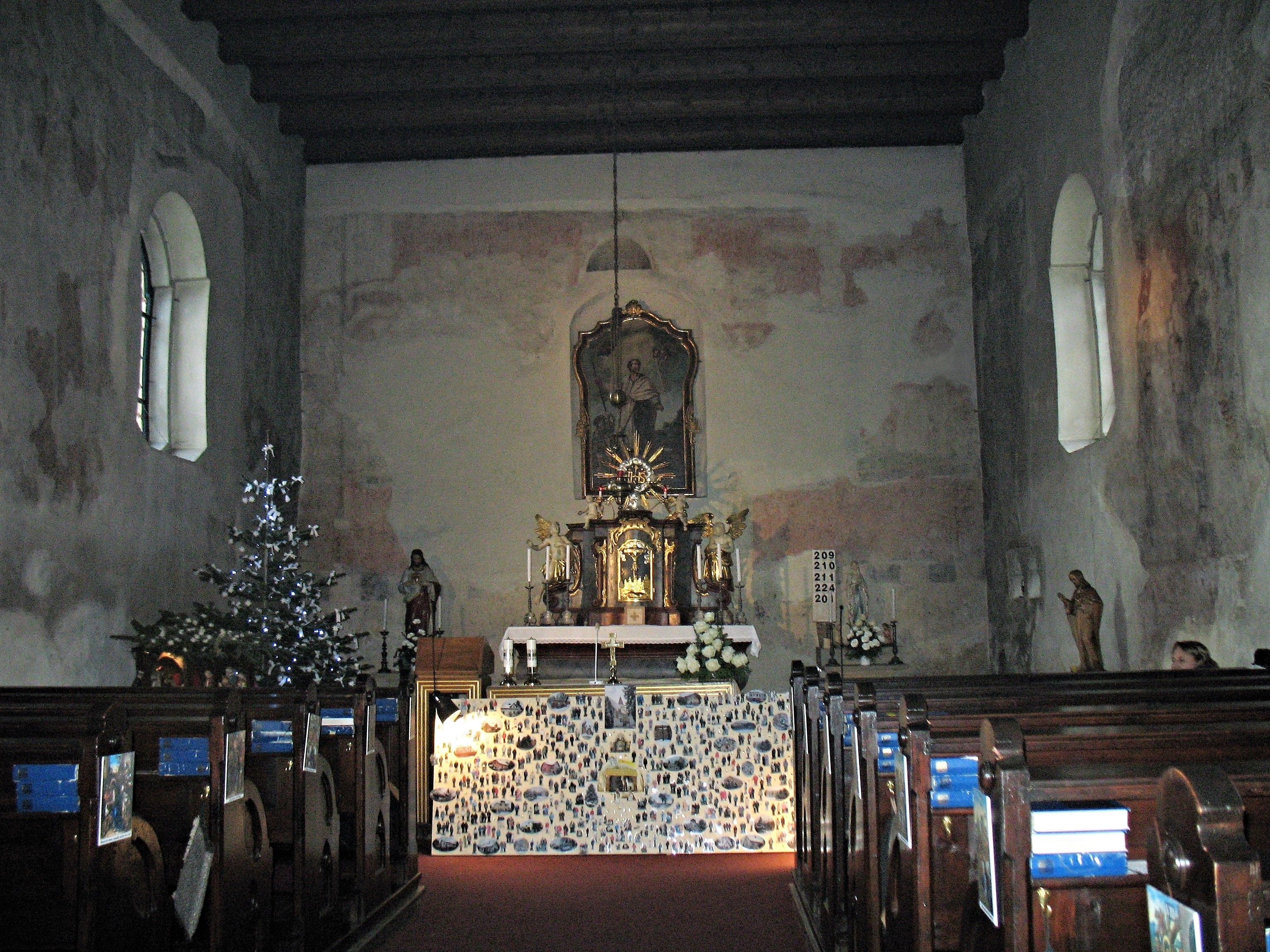 Unikátní betlém v kostele svatého Jakuba Staršího v Praze-Petrovicích